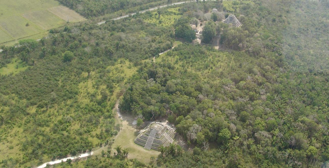 Imagen aerea de la zona arqueologica de chacchoben